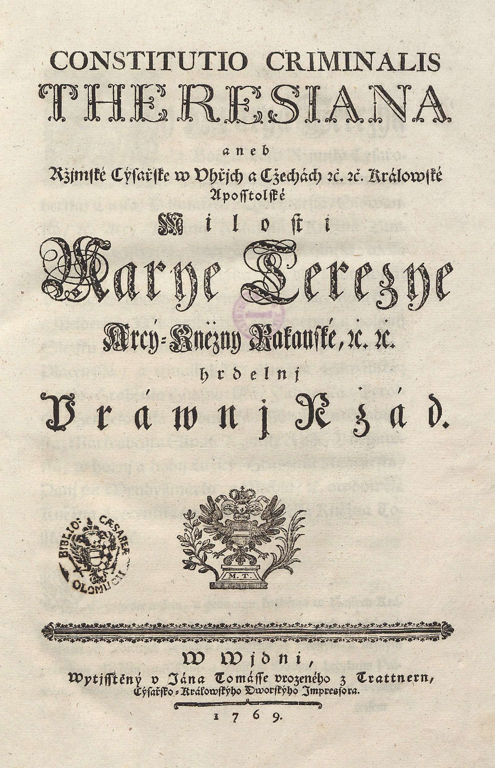 Kniha z fondu Vědecké knihovny v Olomouci